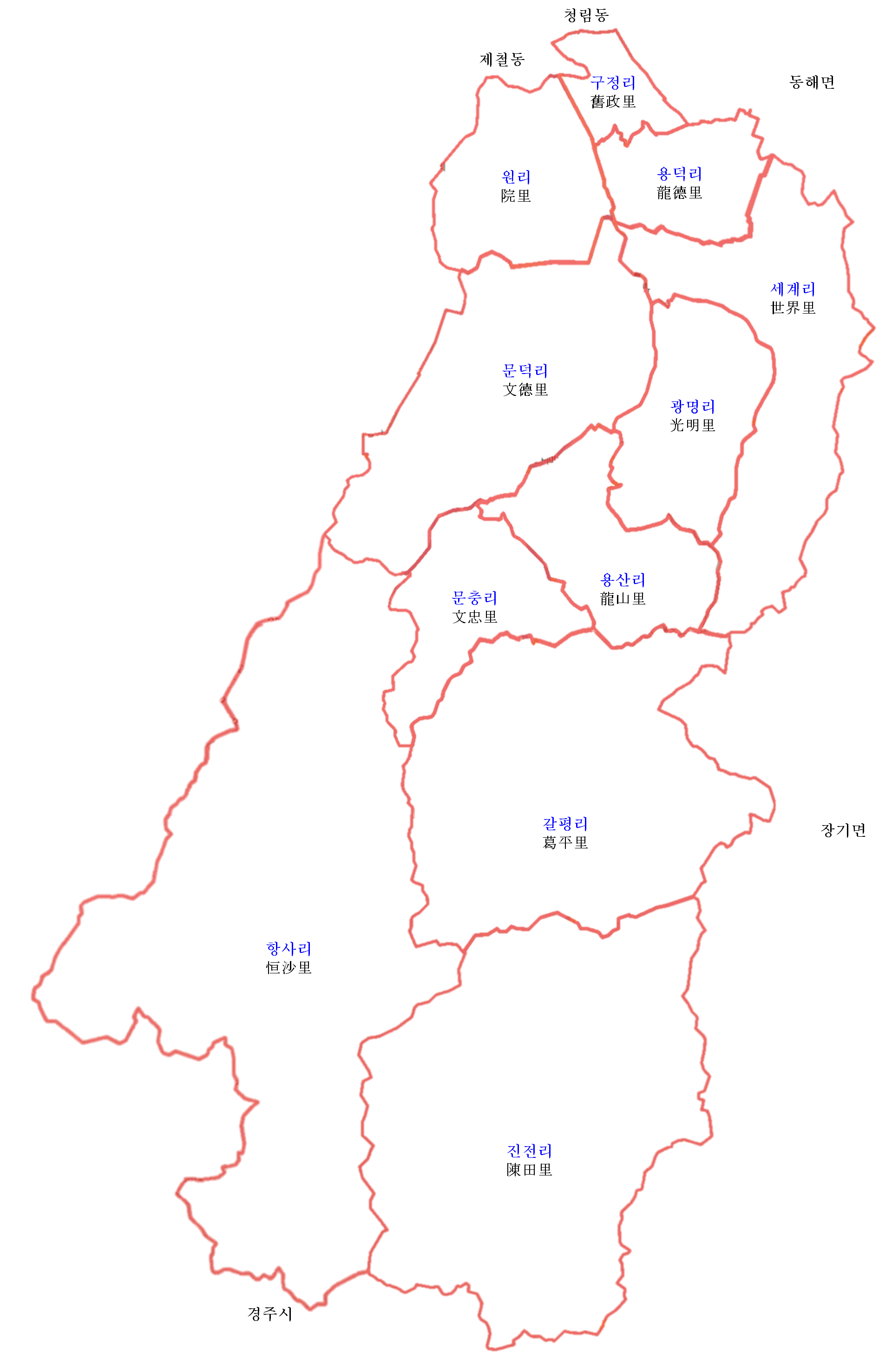 한국어 (조선): 경상북도 포항시 남구 오천읍